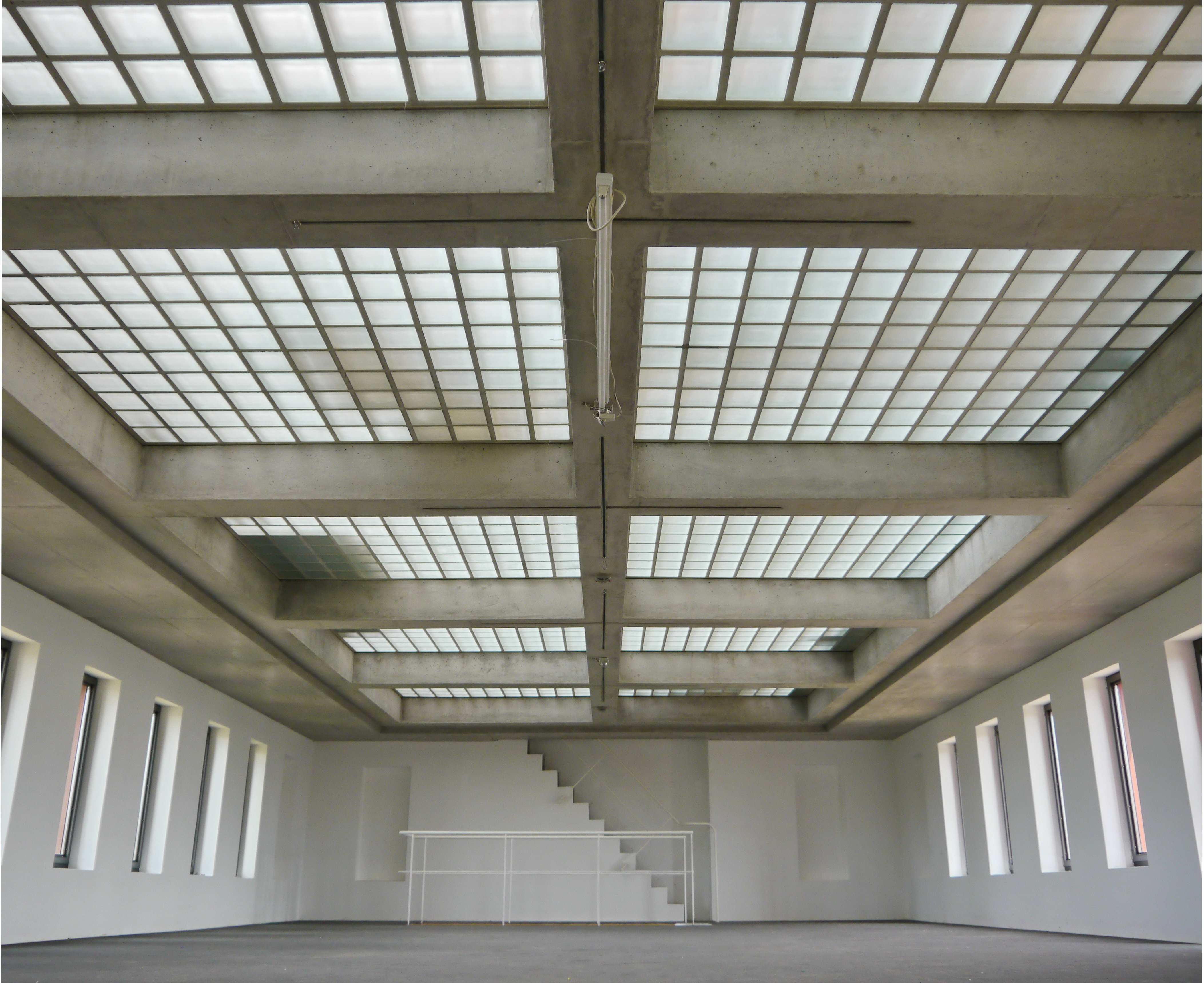 Portikus Frankfurt, Innenansicht: Zwischengeschoss, Juni 2013